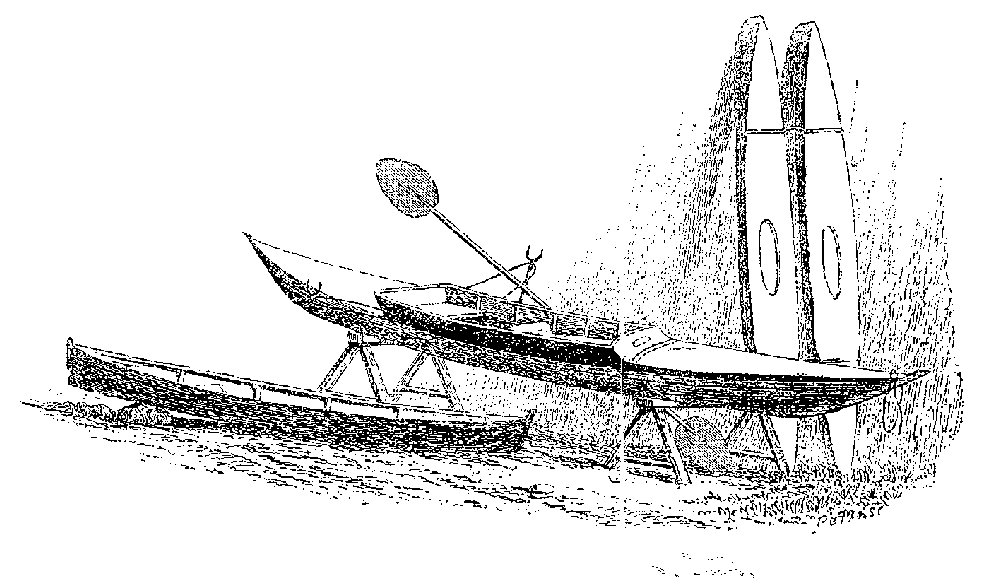 Périssoires